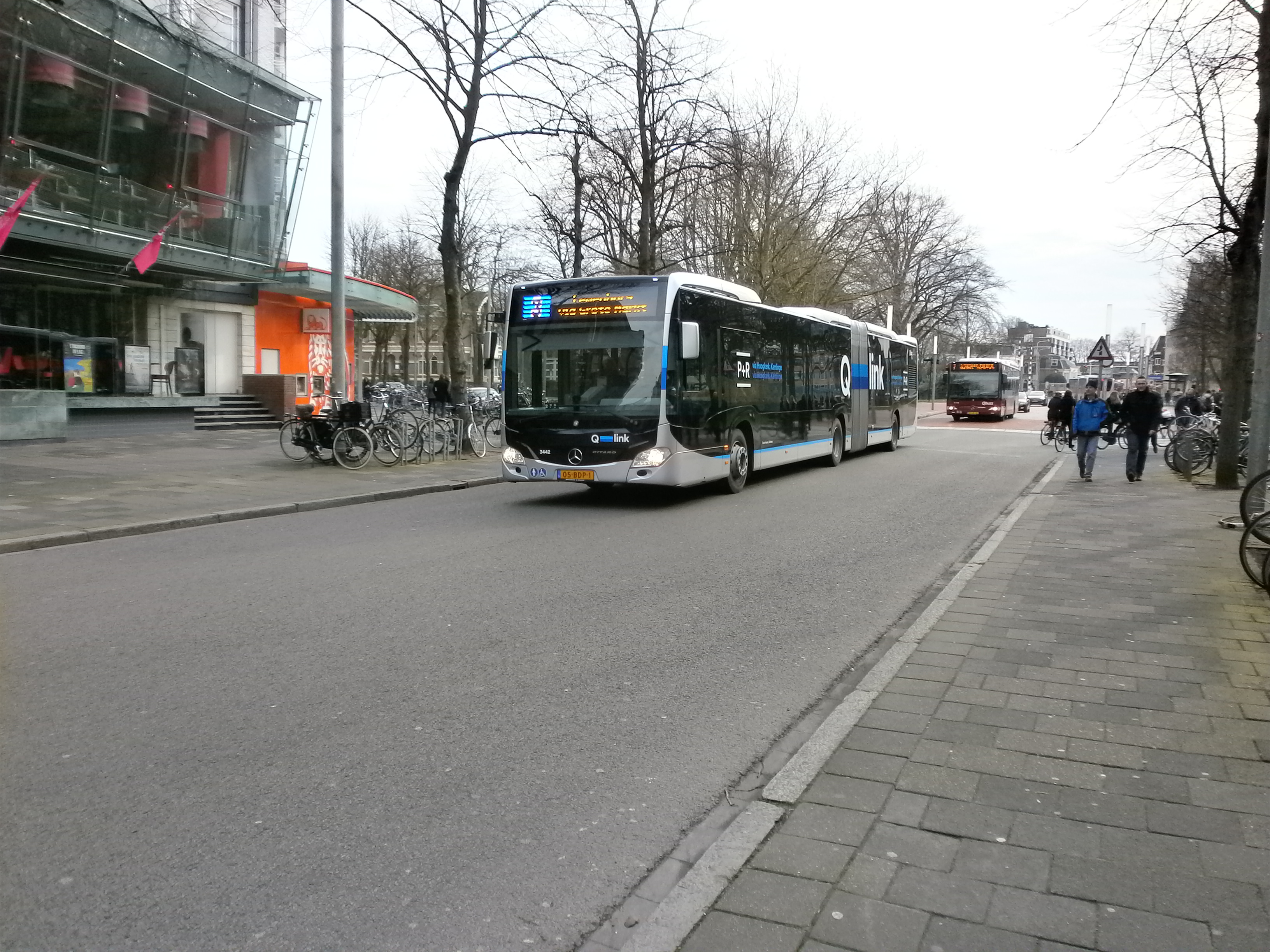 Qlink lijn 3 in Groningen thv het Hereplein